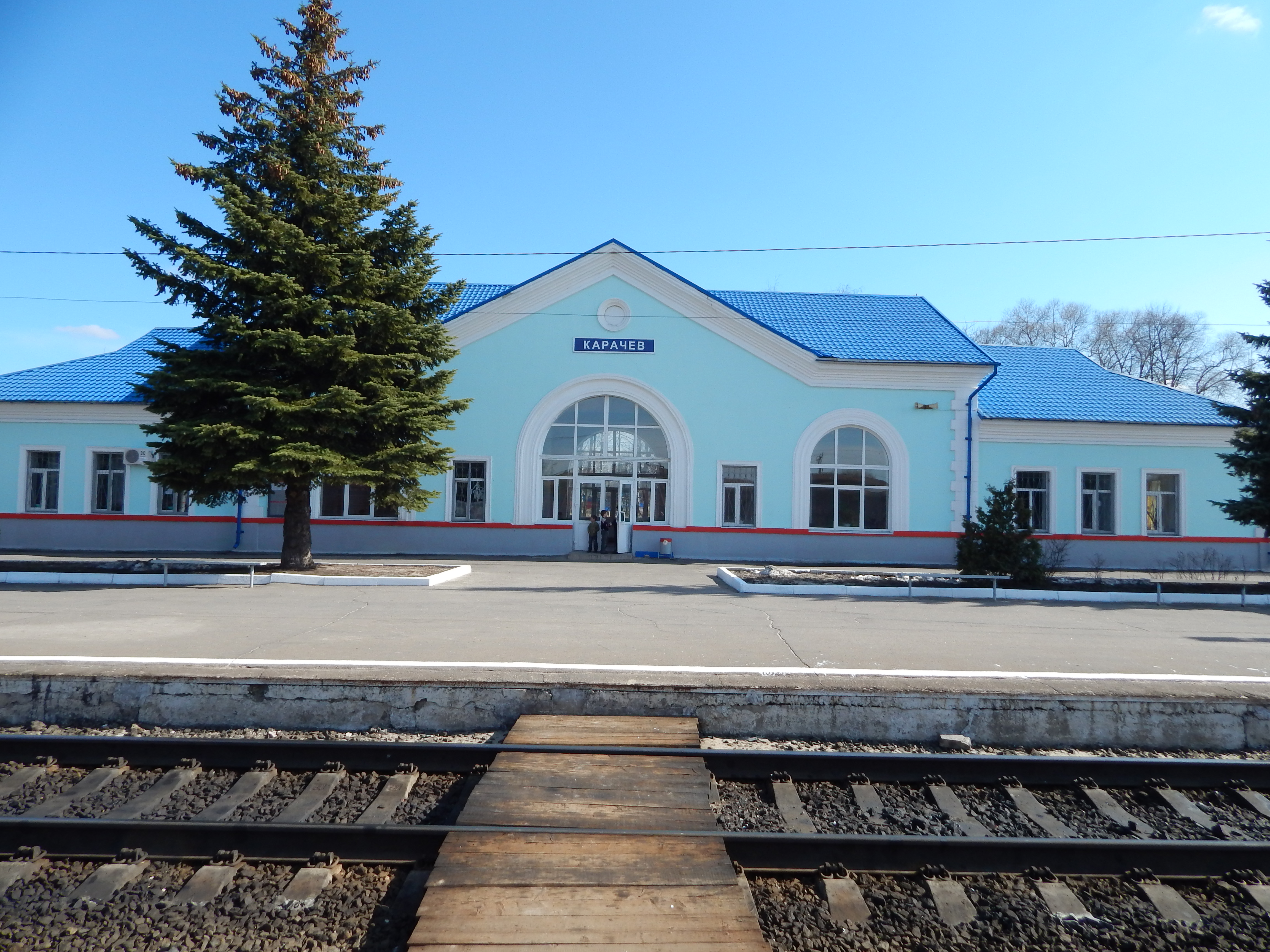 Karachev, Bryansk Oblast, Russia